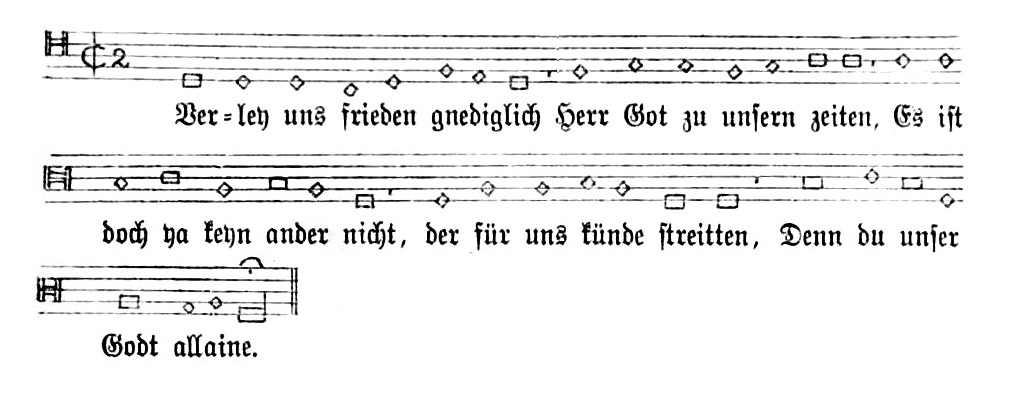 Verleih uns Frieden gnädiglich, Fassung des Gesangbuchs Geistliche lieder auffs new gebessert zu Wittemberg D. Mart. Luth., 1531 (Nachdruck WA 35)